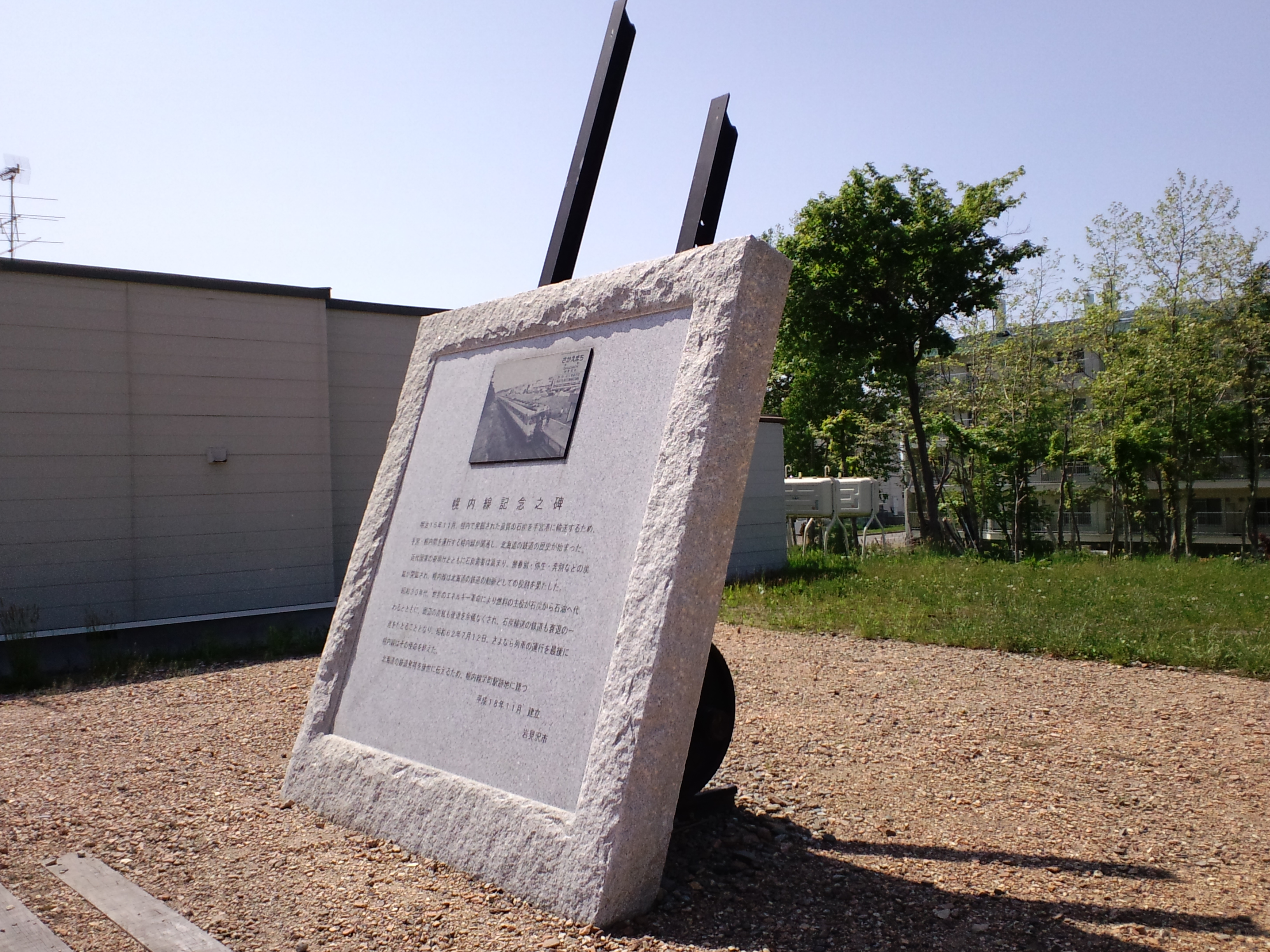 幌内線栄町駅跡地の碑